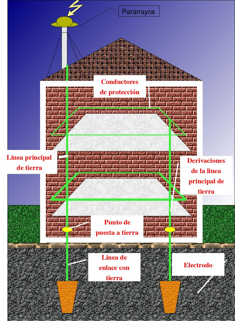 Contactos: 99031-5030 Of. 5363-992/426-3340